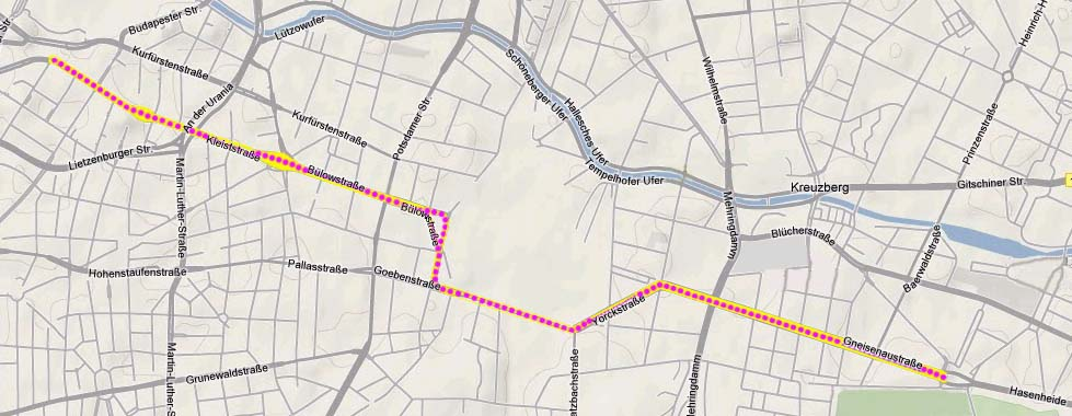 Karte des Berliner Generalzuges